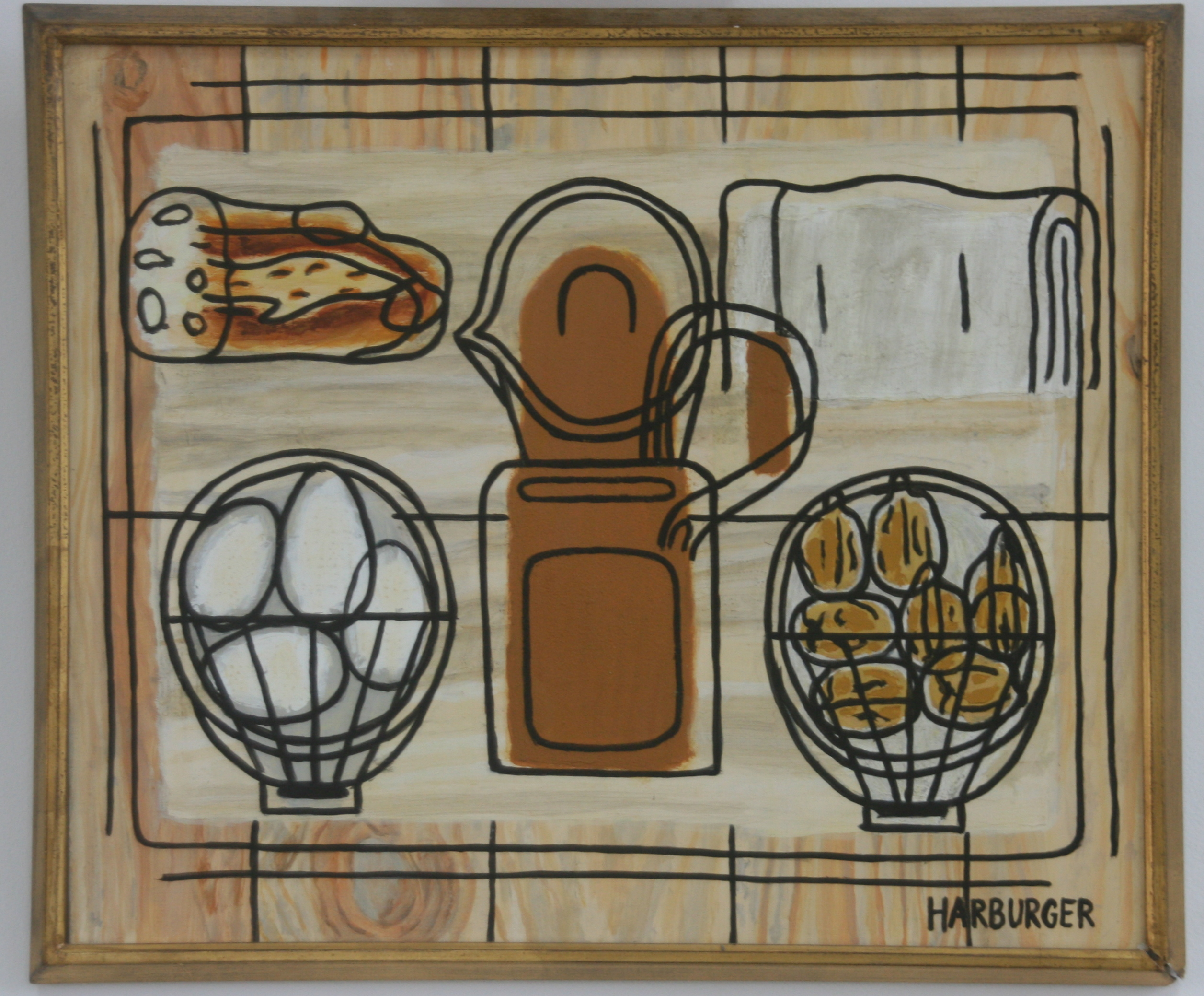 Francis Harburger réalise une réplique d'un tableau de 1952. Il l'offre au musée Nechustan (Israël), en 1972.